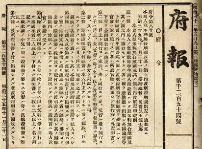 本島人亞米利加合衆國及其領土內渡航證明規則，共十一條